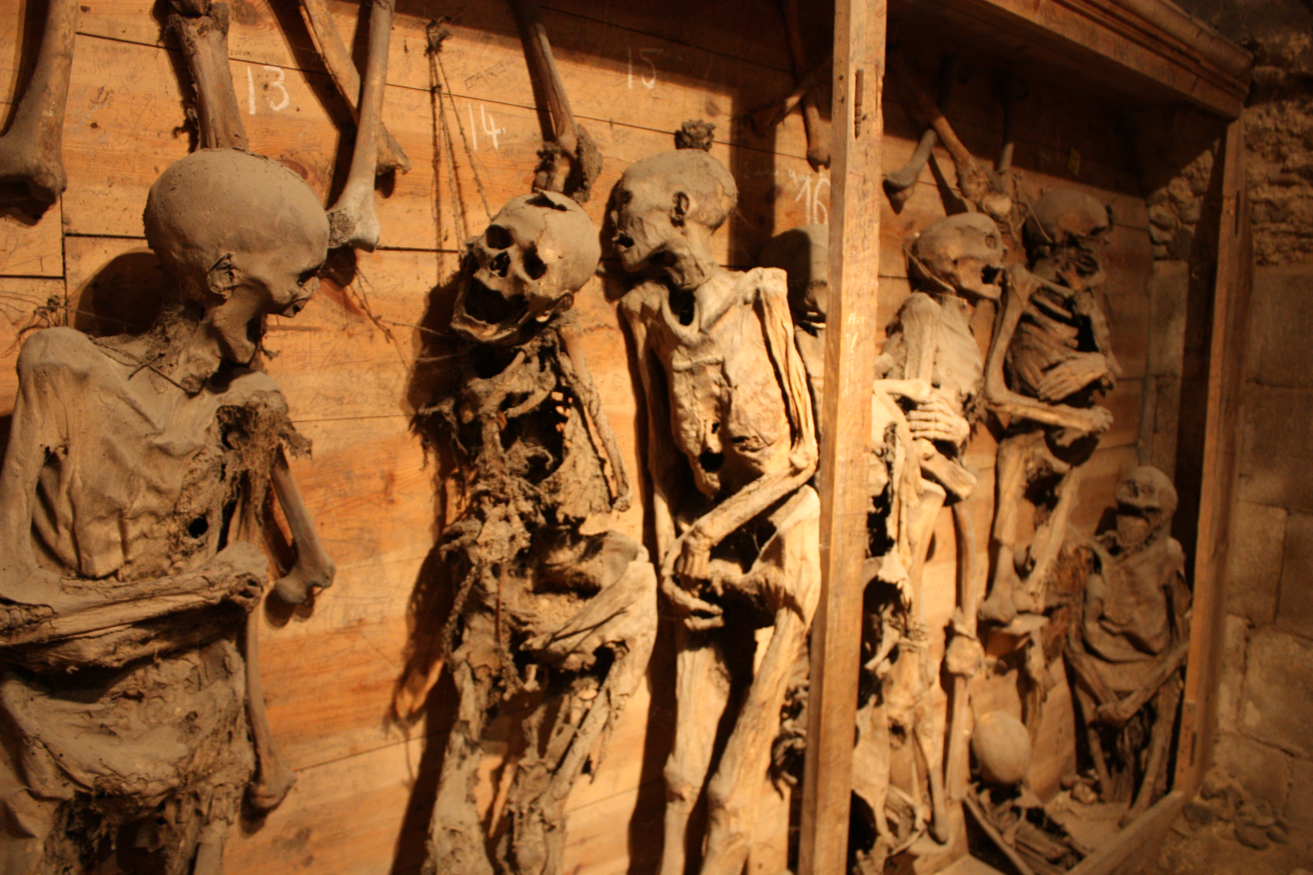 Cadavres momifiés retrouvés dans une sépulture du XVIV° siècle.